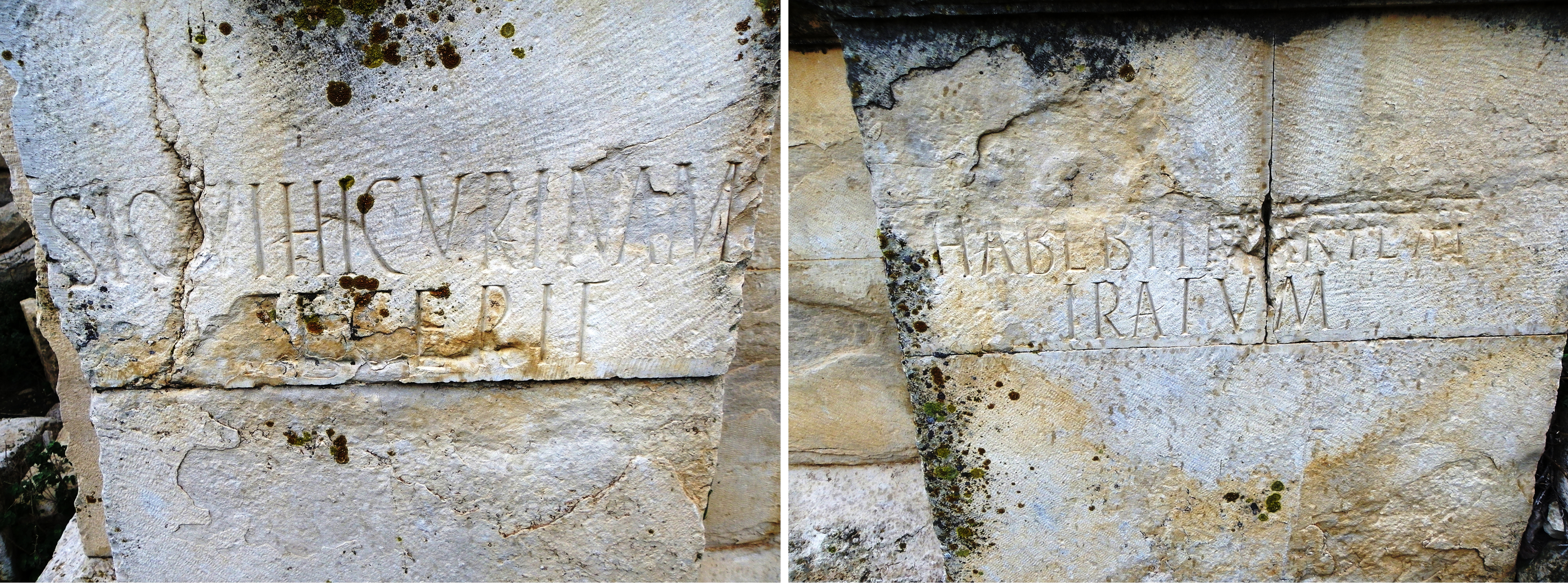 « SI QUI HIC URINAM FECERIT HABEBIT MARTEM IRATUM » « Si quelqu’un urine ici, il aura Mars irrité » !